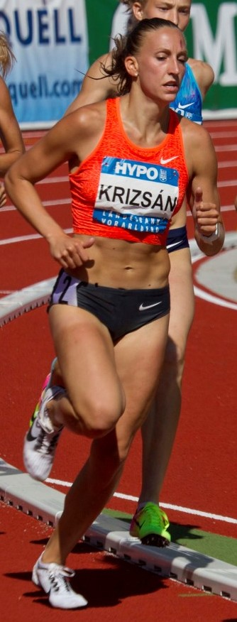 449 maudens 800m